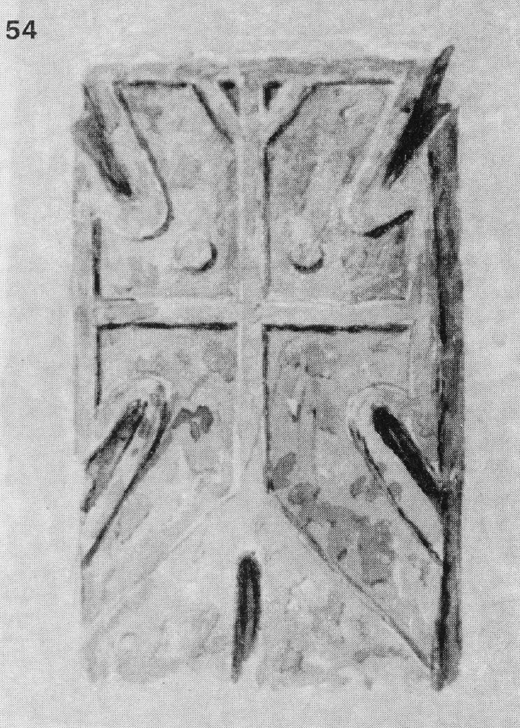 54. Кръст - надгробен паметник, из гробищата на с. Брусен, Врачанско, от 1880 г. Издялан от сив точилен камък; четирикрилен; крилата му се разширяват навън и добиват формата на трапец; долното крило е най-голямо и е забито без цокъл в земята; в средата е изрязан равнокрилен кръст, горното крило на който се разтроява; между горните крила на кръста има по една пъпка, оставена при снишаването на фона и образуването на околния корниз; до основата си има ниша за свещи. Размери: 88x52x15 см. Скициран през юни 1916 г. (Т. 2, обр. 12.)